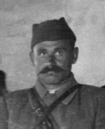 Sava Kovačević nel 1943, ritaglio da File:Na odru leži Pero Ćetković.jpg.